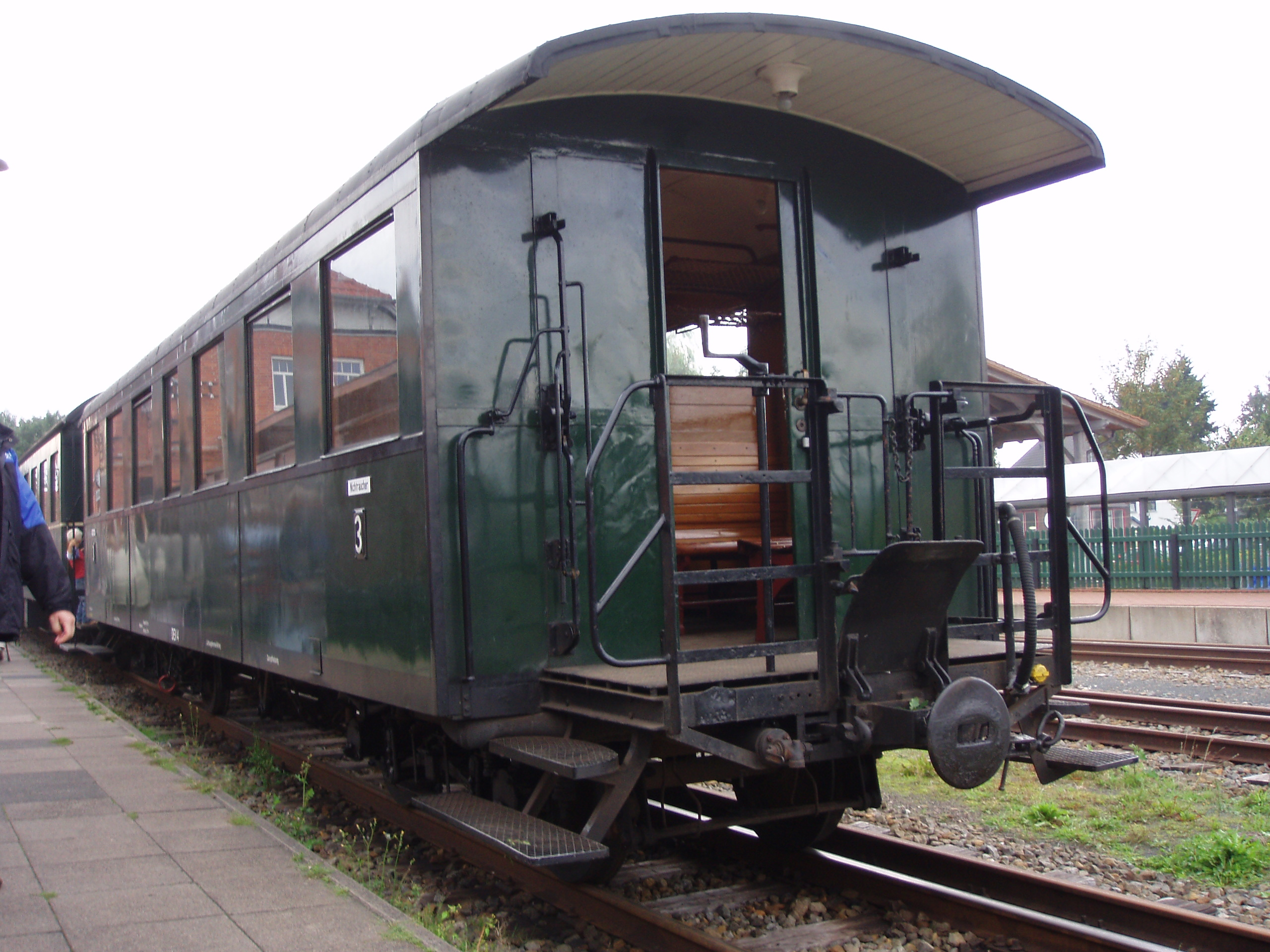 Museumseisenbahn Bruchhausen-Vilsen, Wagen Nr. 4: Ganzstahlpersonenwagen Typ C4i, gebaut 1935 von der Maschinenfabrik Esslingen, eingesetzt bei der Schmalspurbahn Stuttgart-Altensteig als Nr. 6 bis 1963, dann an die Inselbahn Wangerooge verkauft, dort unter Nr. 12 im Einsatz bis 1974. Übergang in den Besitz des DEV, dort Restaurierung.